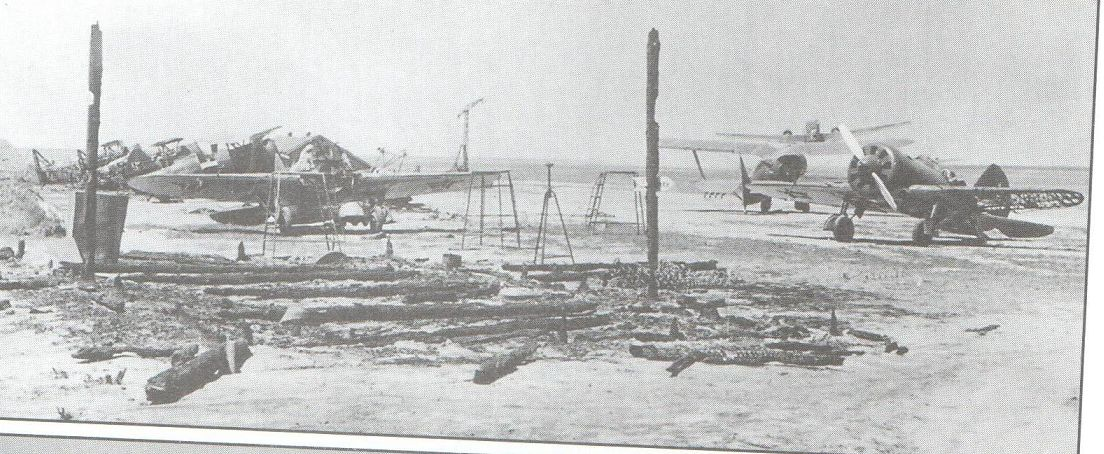 Беларуская (тарашкевіца): Пружанскі аэрадром.